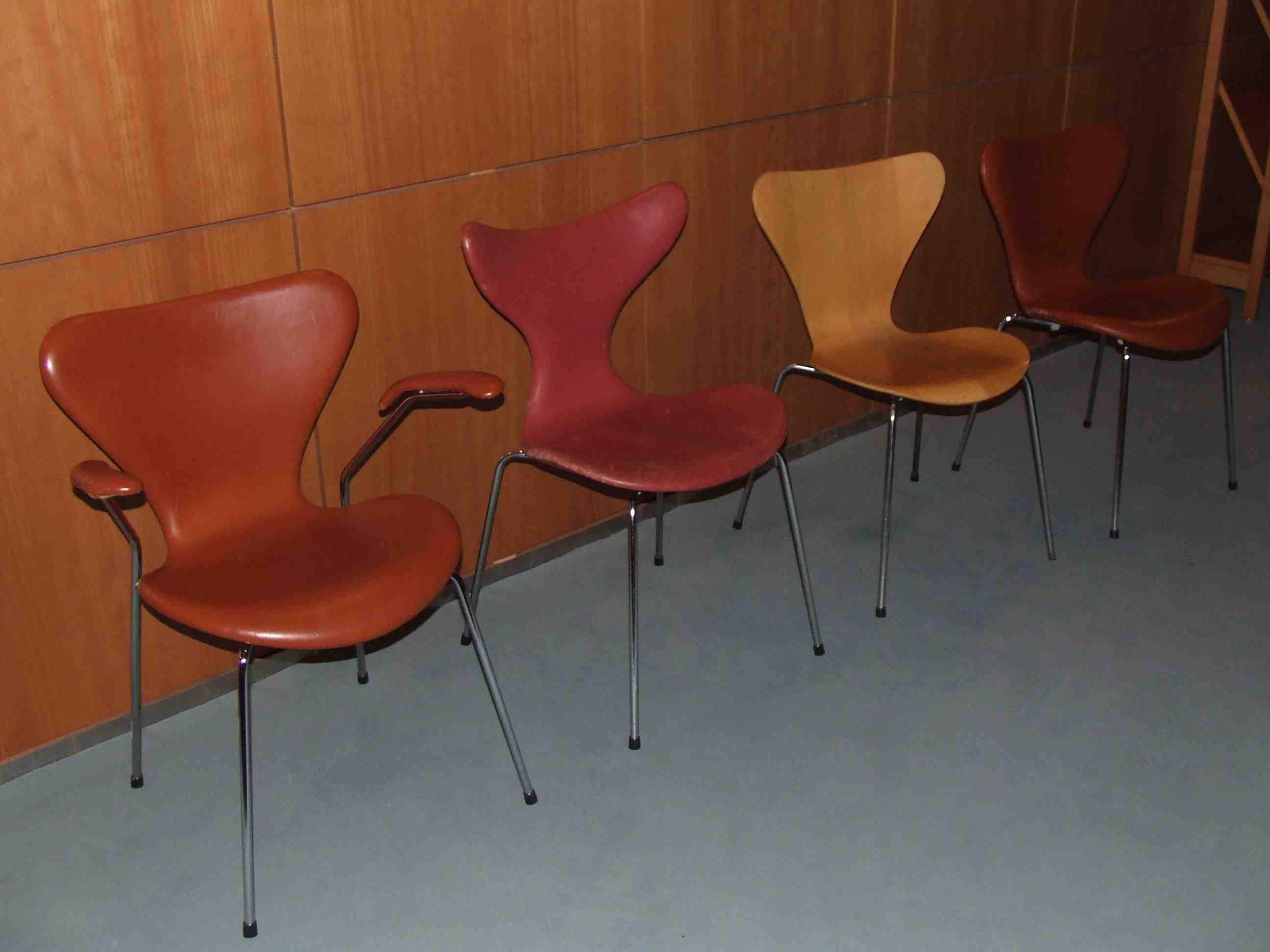 Stühle im Rathaus von Mainz von links nach rechts: Modell 3207 Leder mit Armlehne (Valencia und Erfurter Zimmer) - Fritz Hansen Made in Denmark 1990 Modell 3108 Leder Typ "Möwe" (Empfangsraum und Louisville-Zimmer) Modell 3107 Holz (Kantinenbereich und Lager) Modell 3107 Leder (Valencia und Erfurter Zimmer)